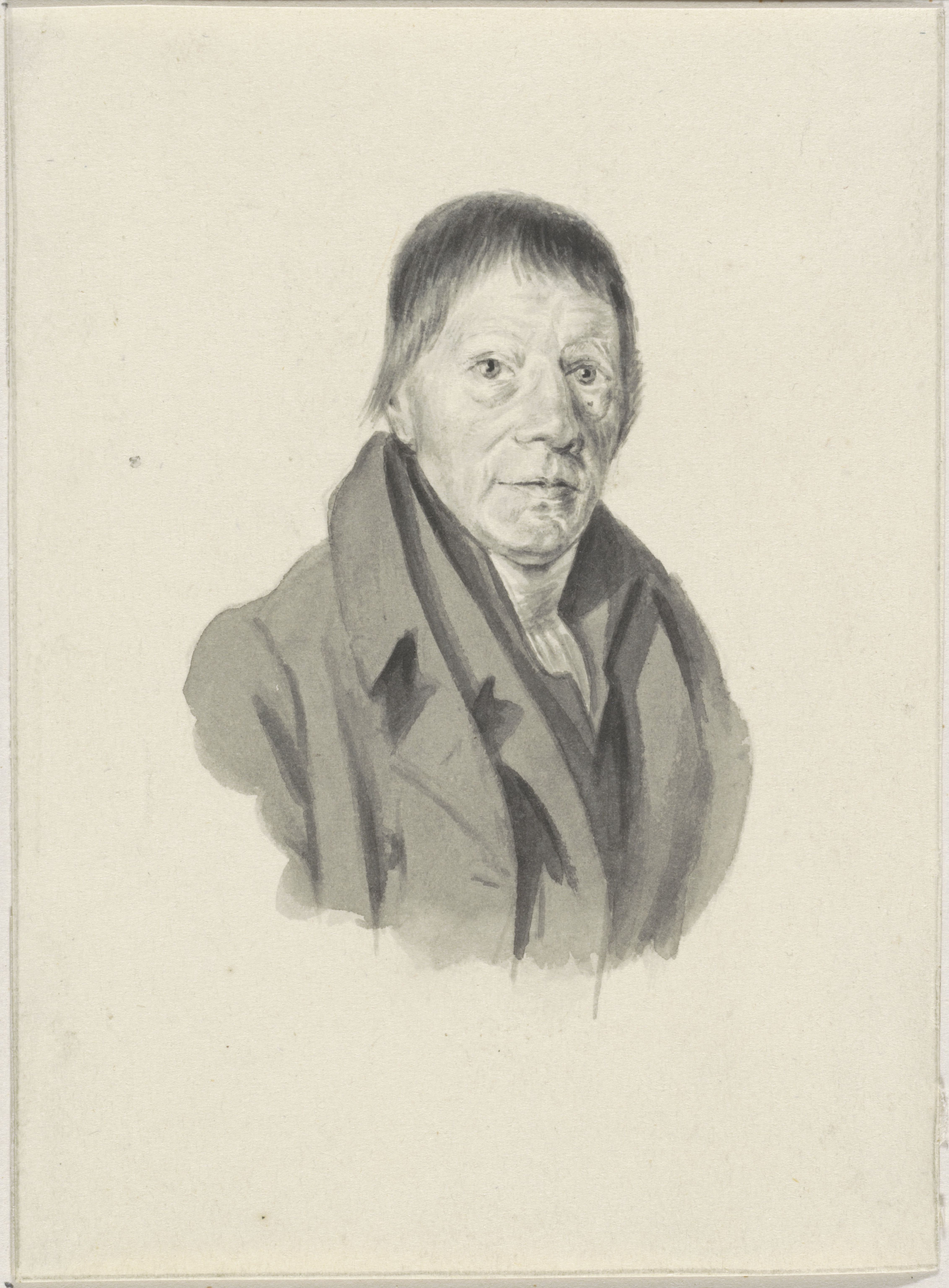 IdentificatieTitel(s): Portret van Hermanus NumanObjecttype: tekening Objectnummer: RP-T-FM-363VervaardigingVervaardiger: tekenaar: Jan Simon Voddigelnaar ontwerp van: CaspariDatering: 1830 - 1862Fysieke kenmerken: penseel in grijsMateriaal: papier Techniek: penseelAfmetingen: h 122 mm × b 90 mmOnderwerpWat: portrait, self-portrait of artistWie: Hermanus NumanVerwerving en rechtenCredit line: Bruikleen van de gemeente AmsterdamVerwerving: bruikleen 1889Copyright: Publiek domein